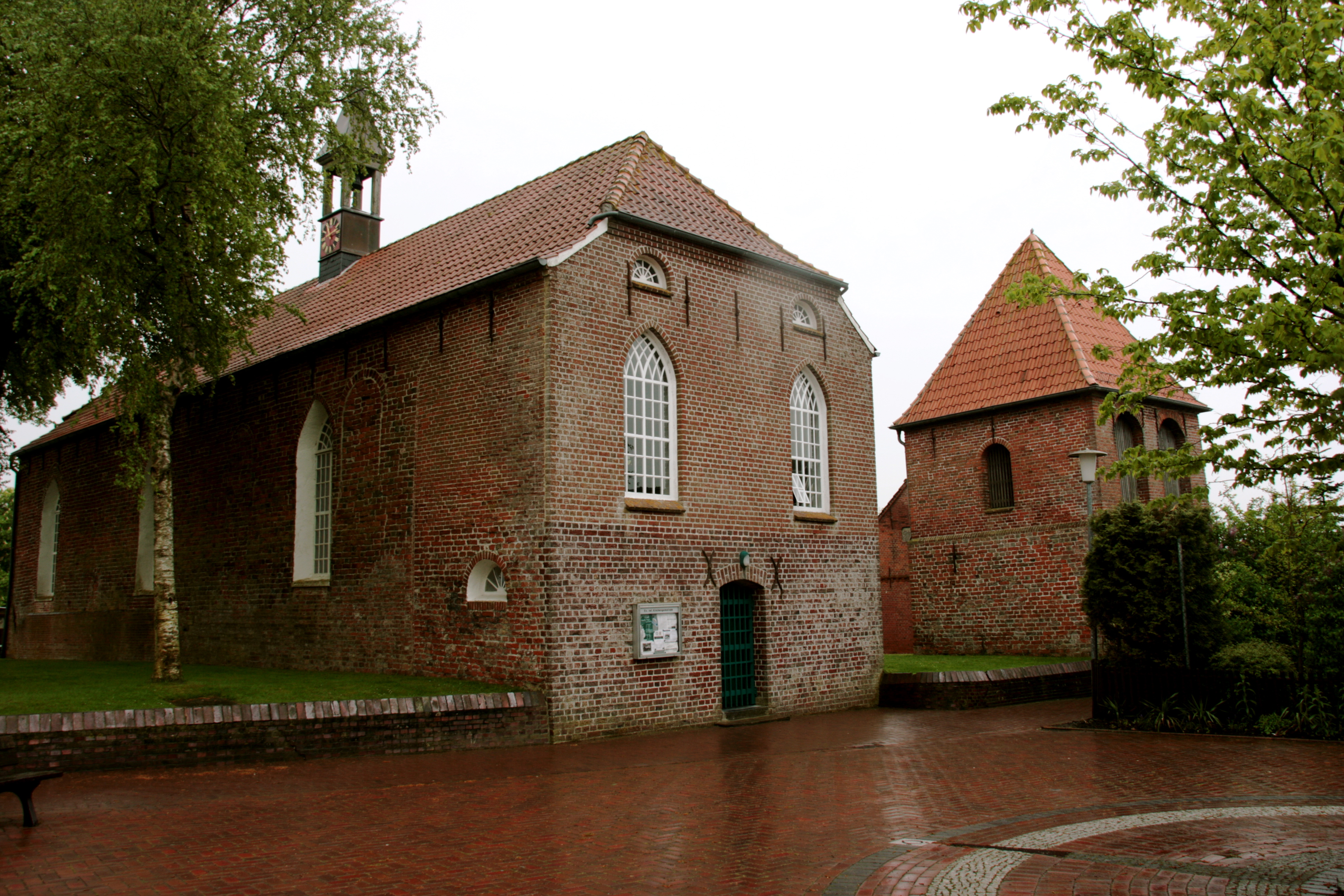 Kirche Wirdum